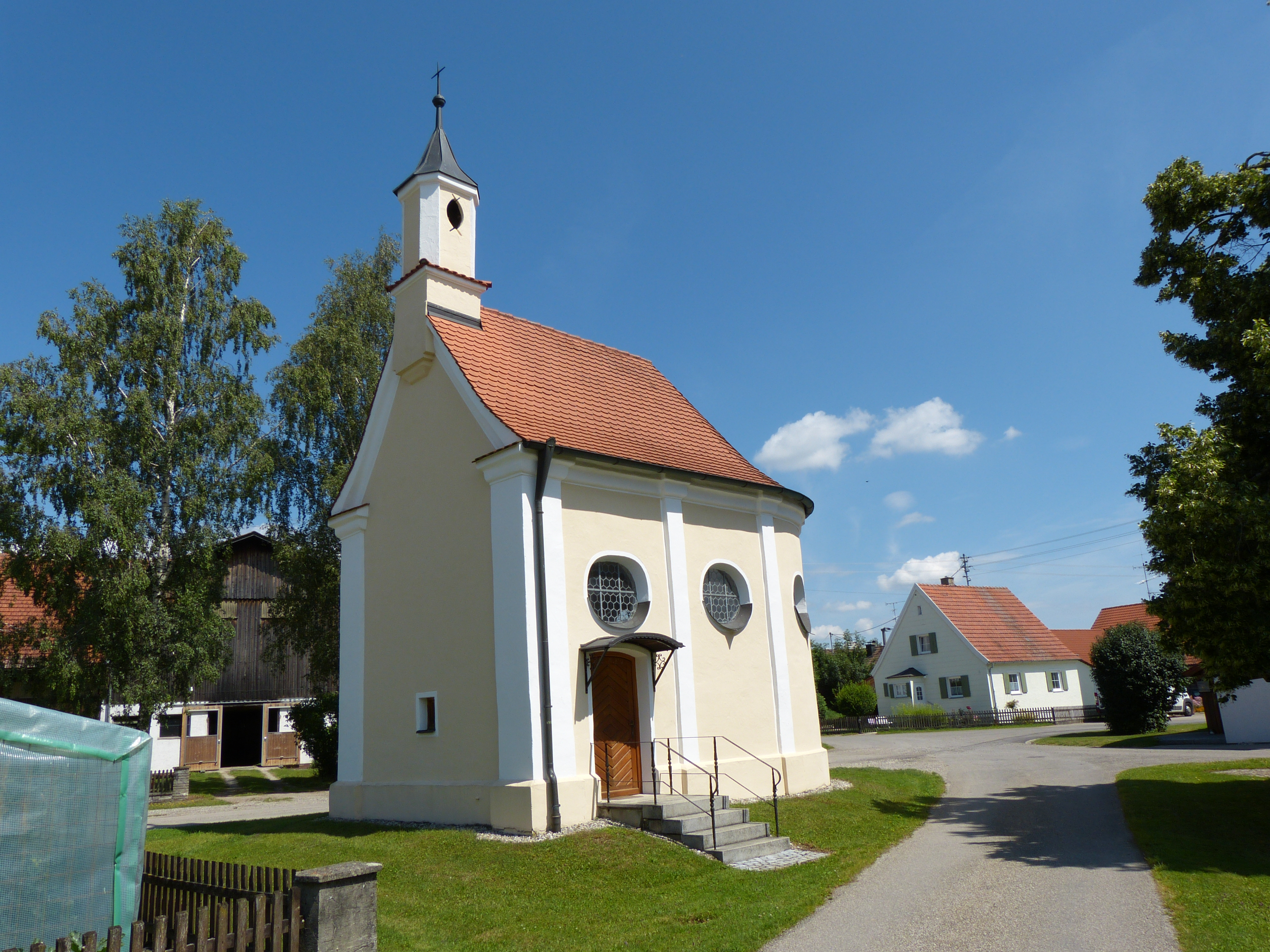 St. Antonius, Kirchstetten, Landkreis Unterallgäu, Bayern